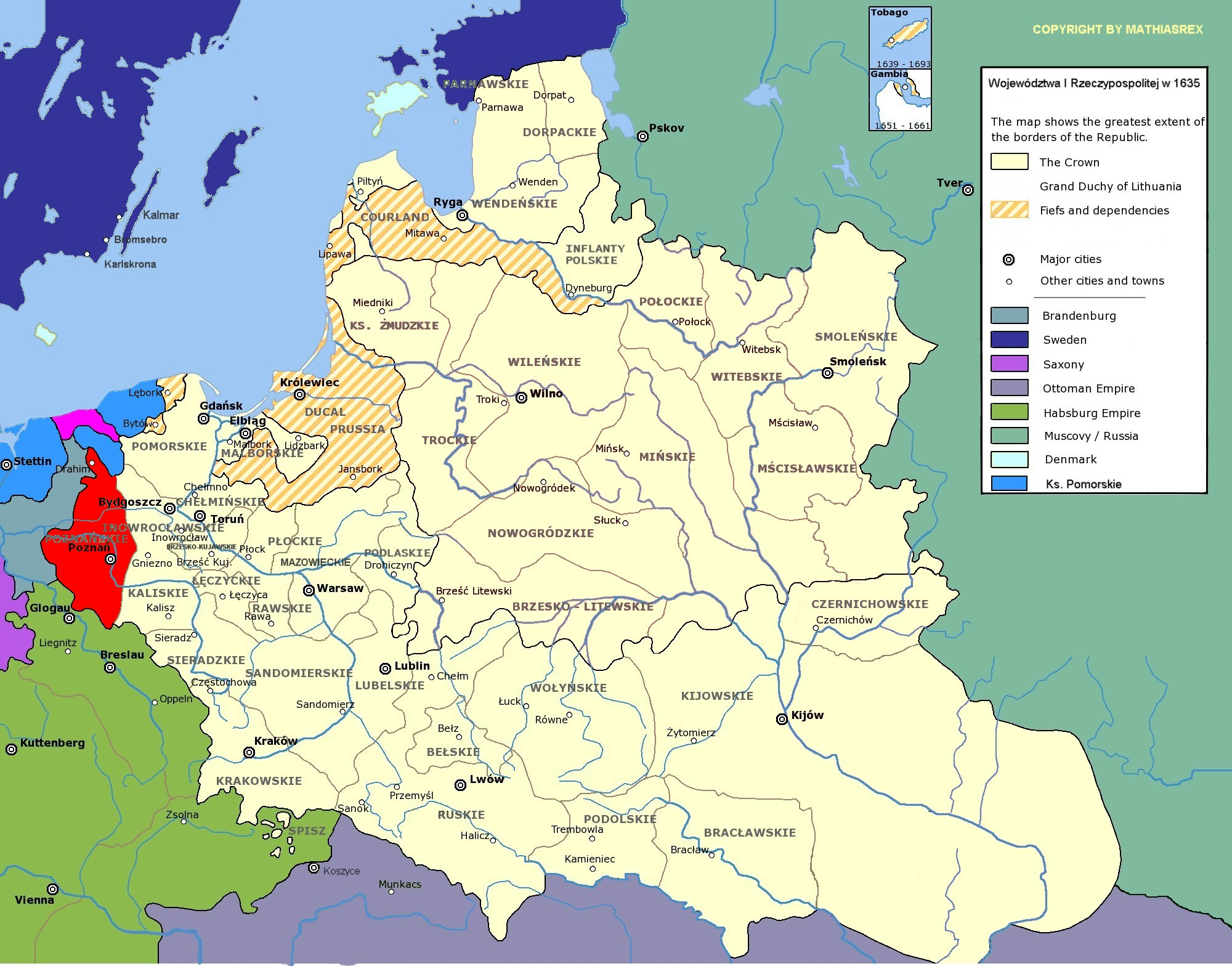 województwo poznańskie I Rzeczypospolitej A modified copy of Image:Rzeczpospolita voivodships.png by Halibutt